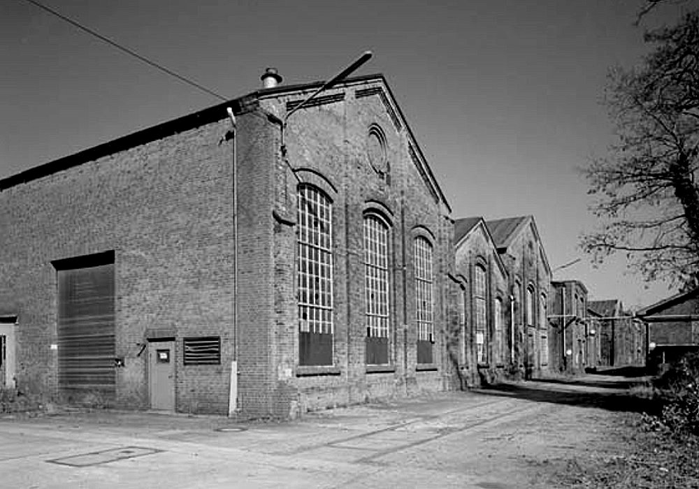 ehemaliges Harburger EisenbahnausbesserungswerkThis is a photograph of an architectural monument.